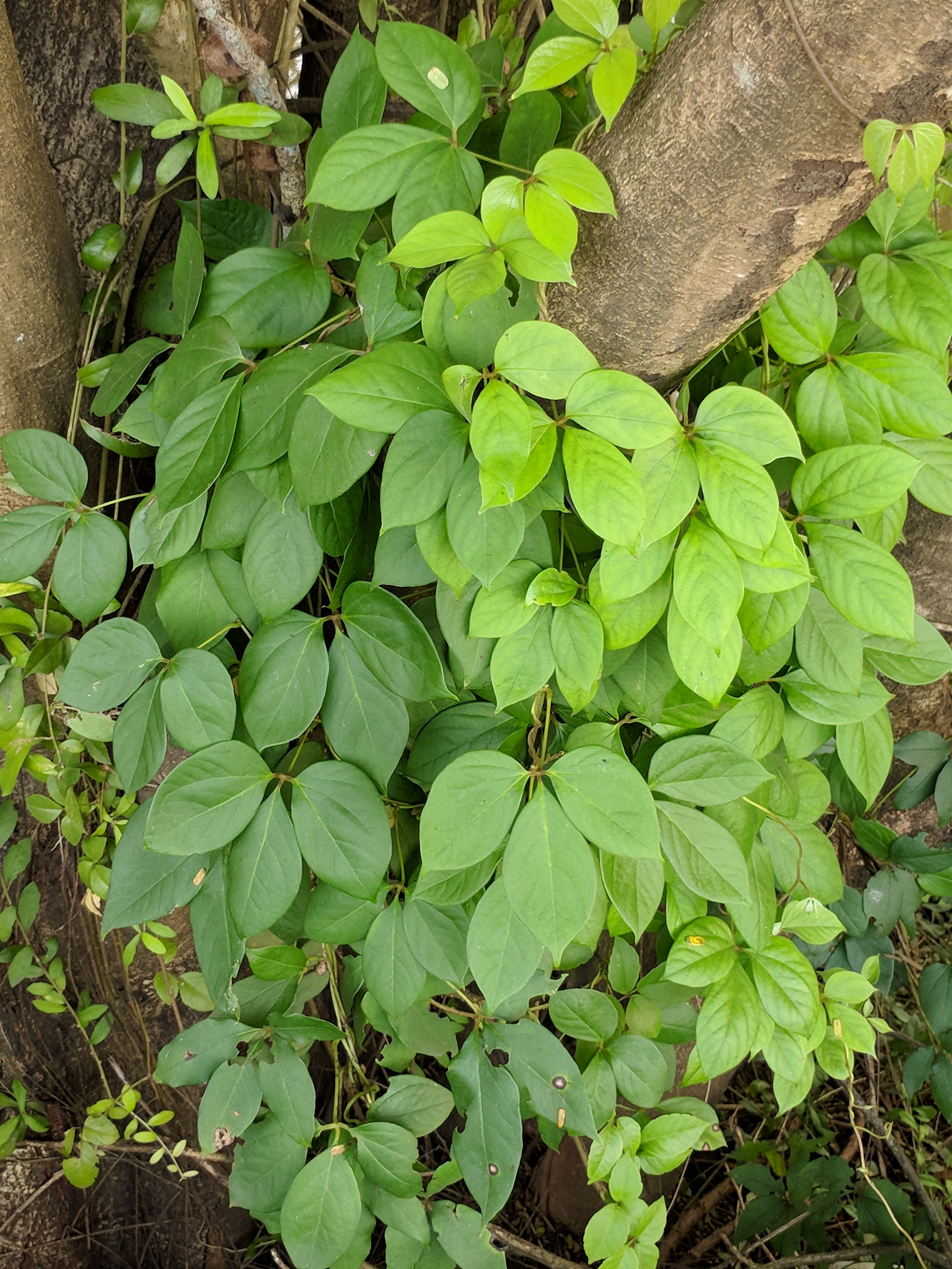 Dioscorea pentaphylla